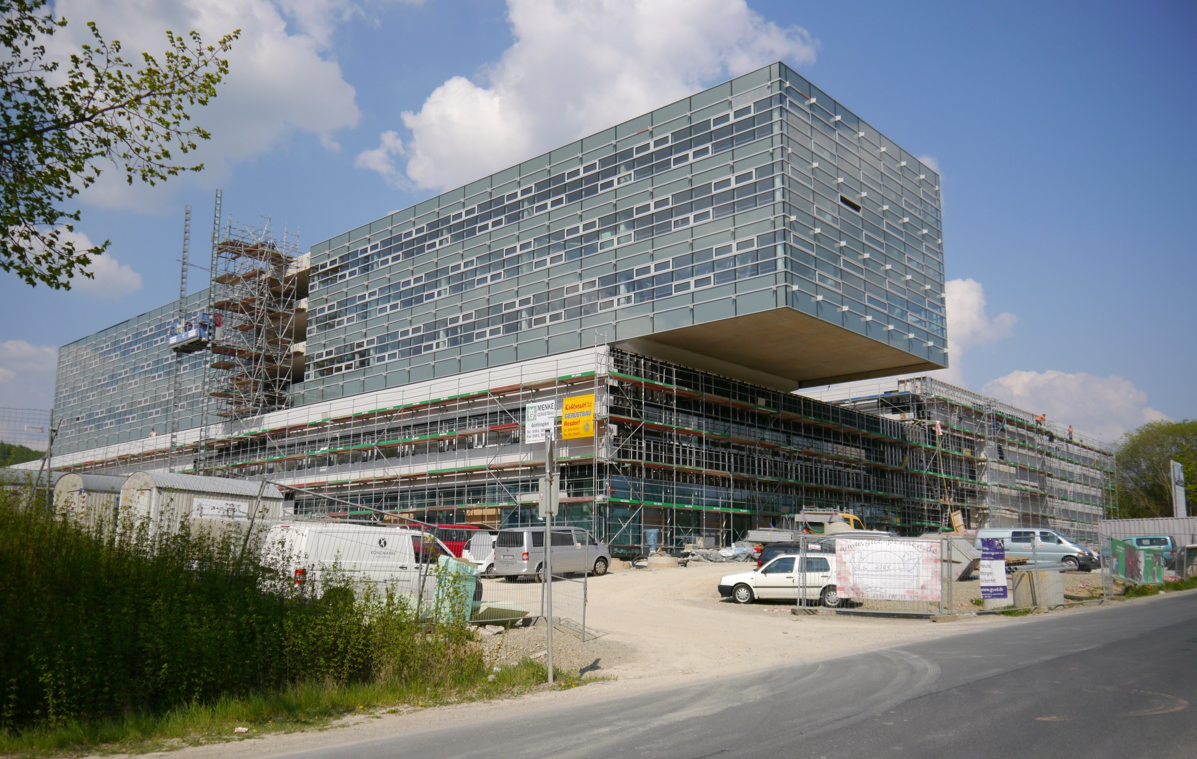 Das im Bau befindliche MPI für Sonnensystemforschung am Nordcampus in Göttingen.